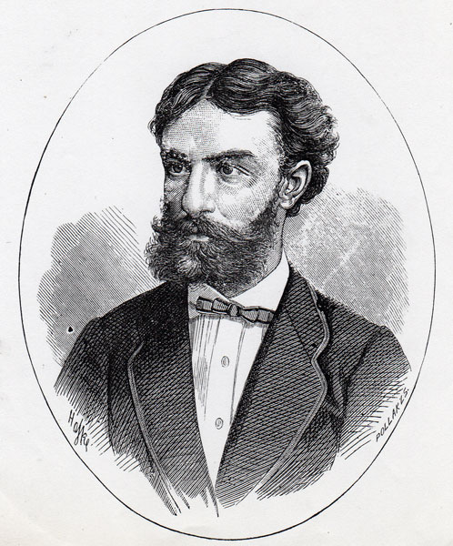 Коста Трифковић (1843-1875)